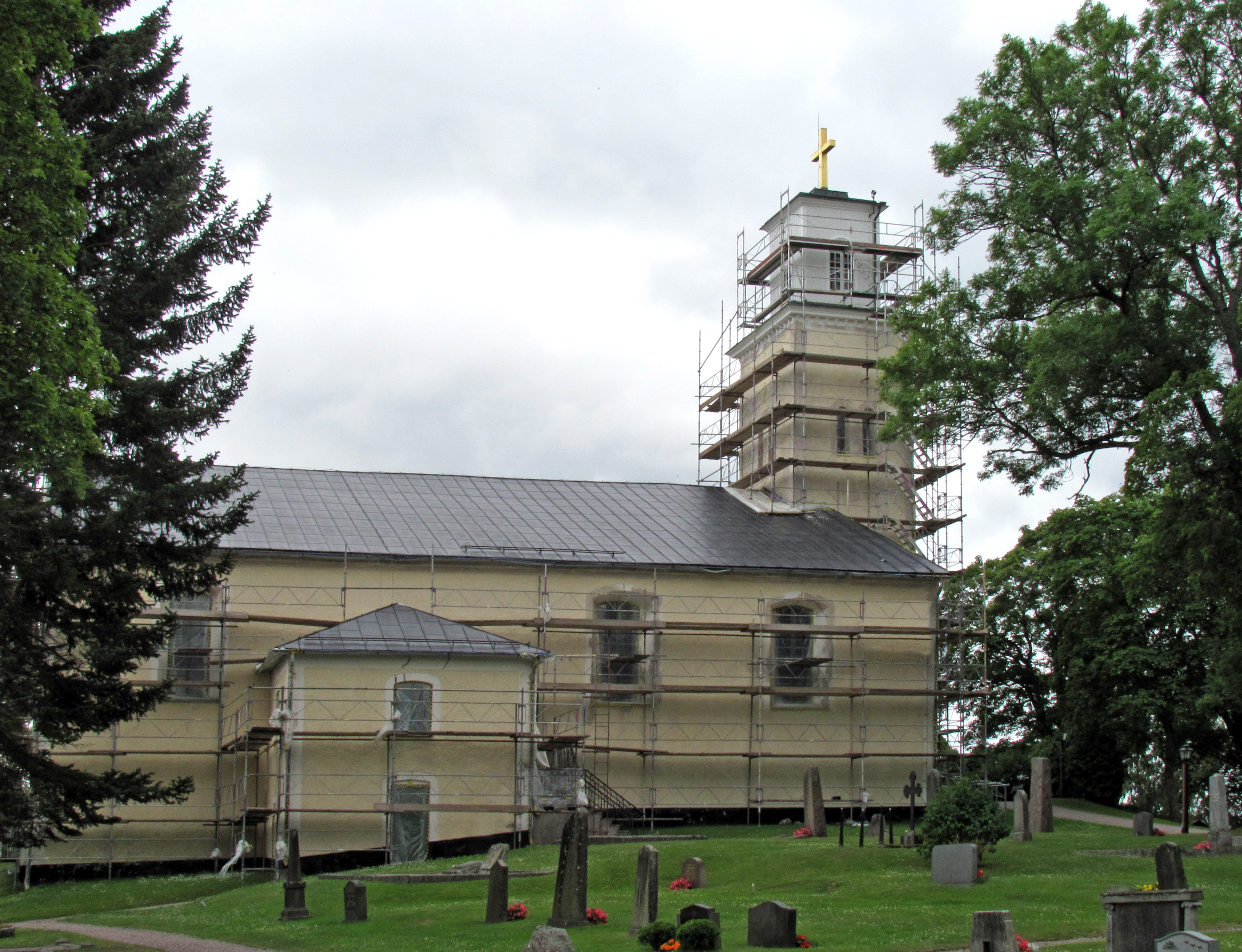 Björskogs kyrka